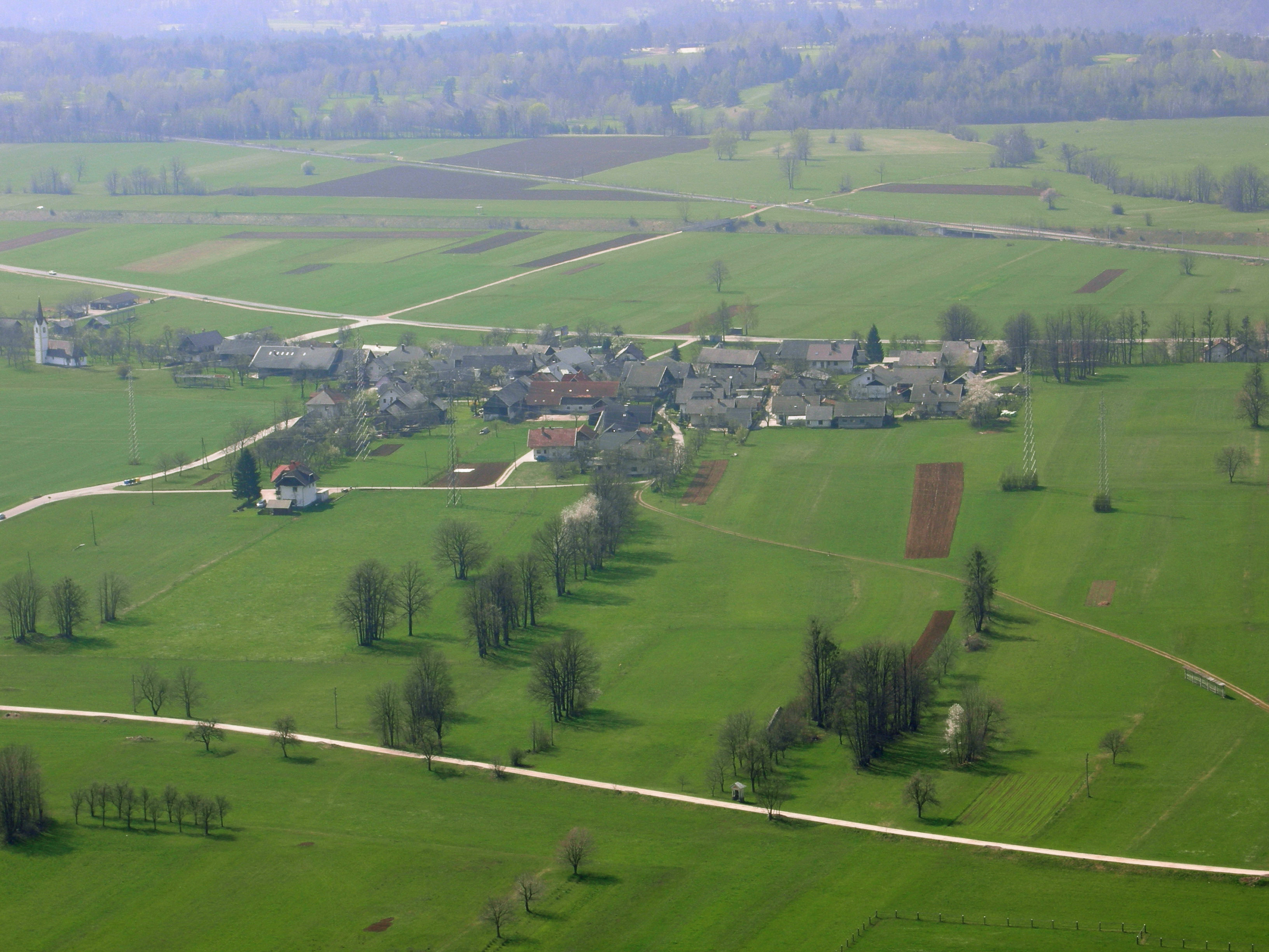 Vrba na Gorenjskem - the birth-village of France Prešeren.